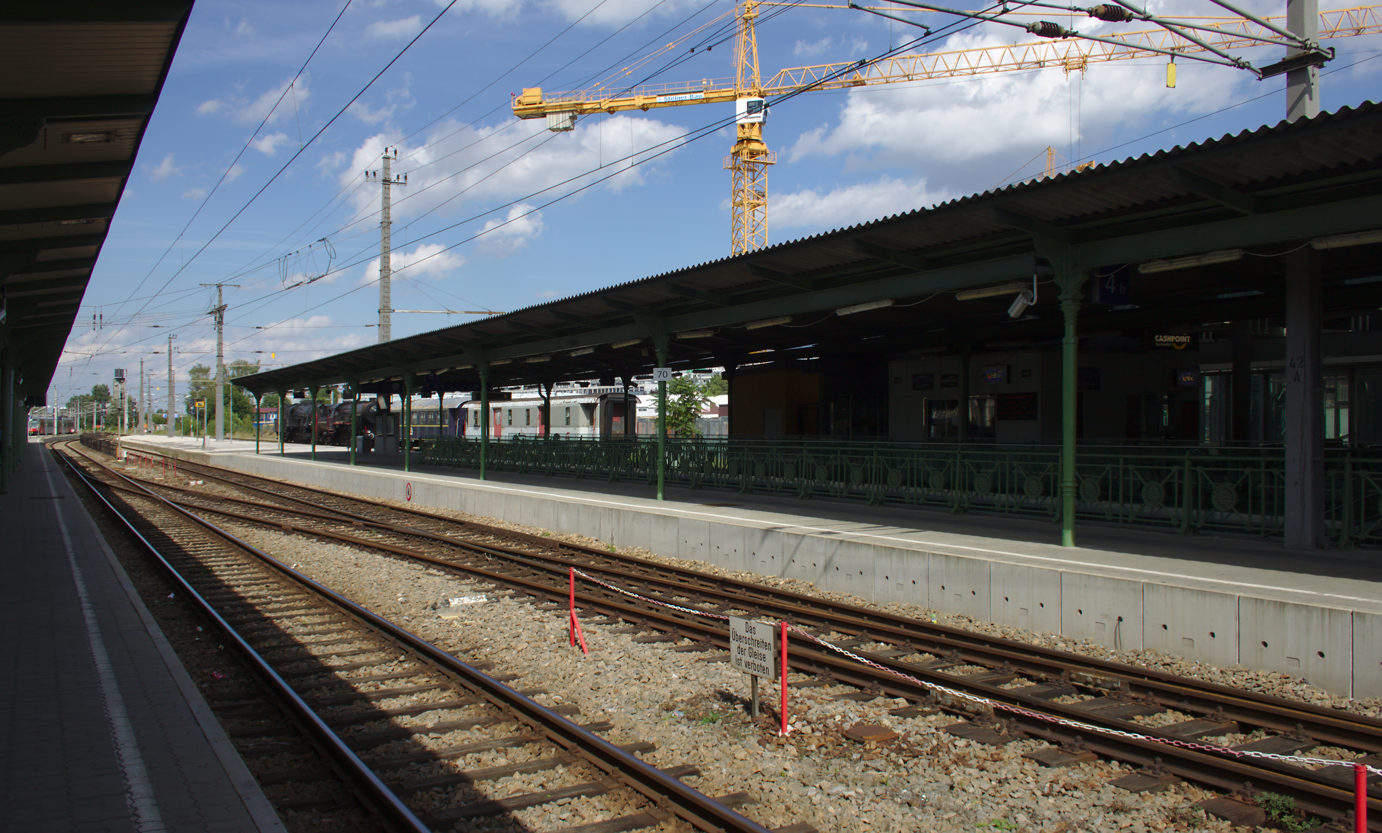 Eisenbahnstrecke, Wiener Vorortelinie - Teilbereich Heiligenstadt mit Station Heiligenstadt